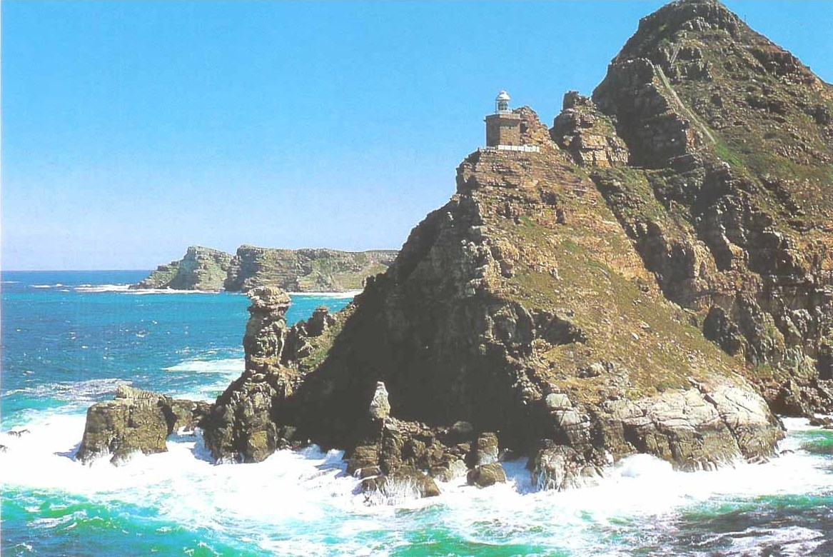 Kap vun der Gudder Hoffnung